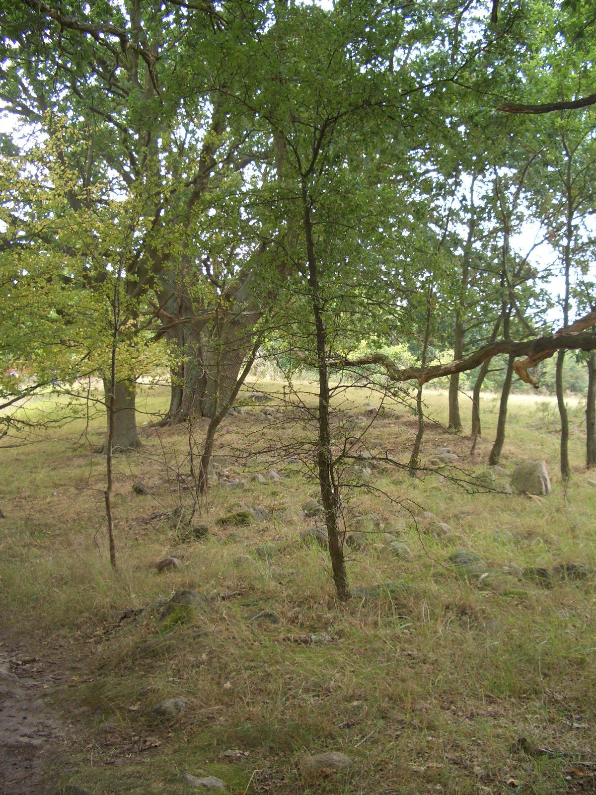 Blockpackung auf dem Hauptmannsberg, nördlich von Carwitz (Mecklenburg-Vorpommern).